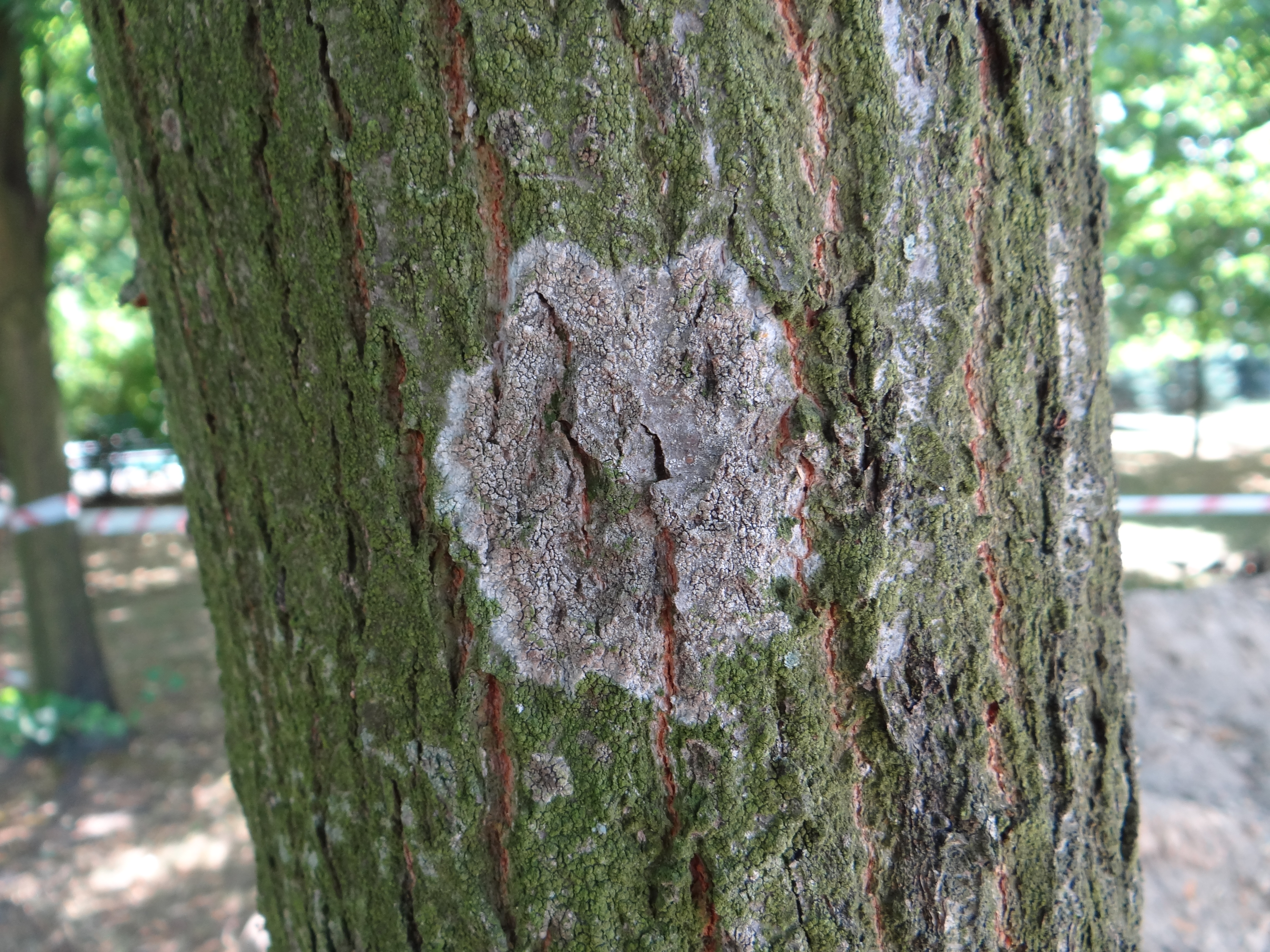 Phlyctis argena (location: Poland, województwo małopolskie,Orawka)